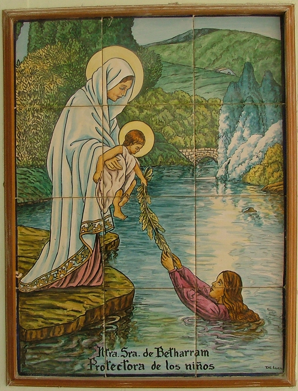 Tableau de la Vierge de Bétharram.